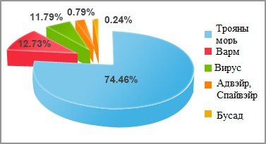 Монгол: malware